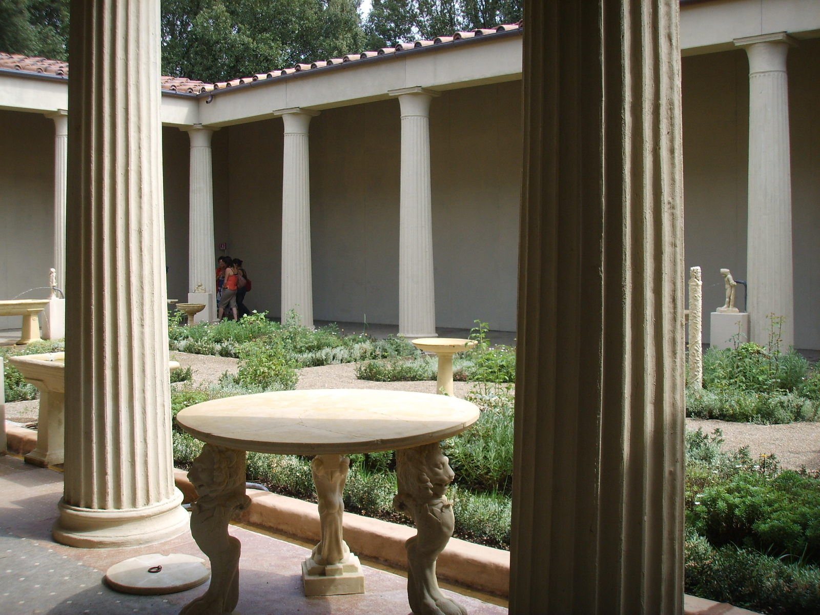 Ricostruzione del giardino della Casa dei Vettii a Pompei (mostra al giardino di Boboli, 2007).